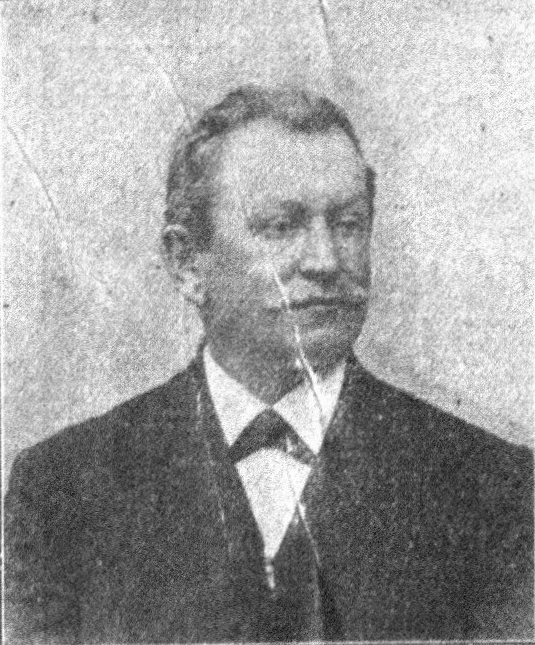 Österreichischer Politiker, Reichsratswahl 1907, Name siehe Dateiname